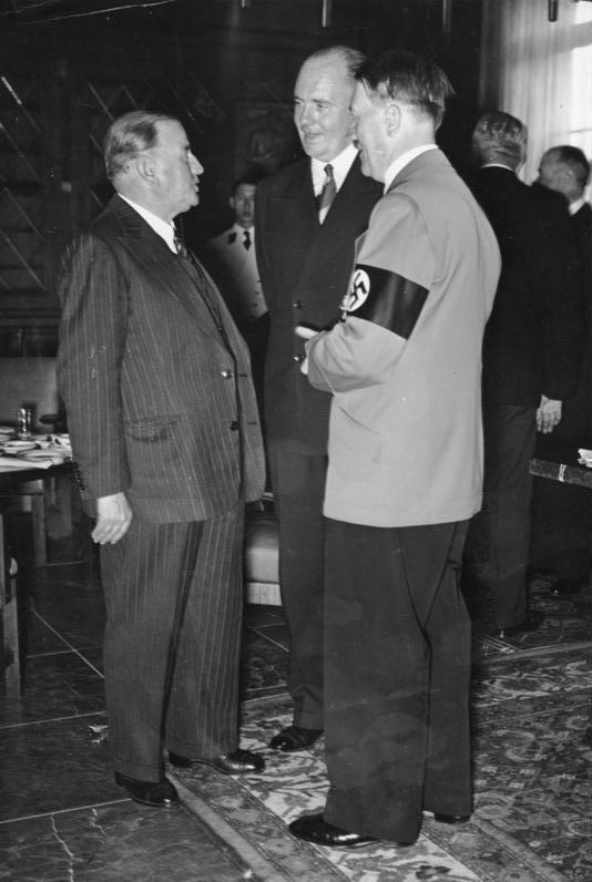 Münchener Abkommen, Hitler und Daladier Die ersten Originale mit Sonderflugzeug nach Berlin. Vier Mächte in München. In München im Führerbau begann am Donnerstag mittag die Bespechung zwischen dem Führer, Mussolini, Chamberlain und Daladier. Der Führer im Gespräch mit Daladier; Mitte Legationsrat Schmidt, der Dolmetscher. 29-9-38 12877-38 [München.- Besprechung zwischen dem französischen Ministerpräsidenten Édouard Daladier (links) und Adolf Hitler] Abgebildete Personen: Daladier, Edouard: Ministerpräsident, Vorsitzender Radicale Partei, Frankreich Schmidt, Paul Otto Gustav Dr.: Chefdolmetscher von Hitler, Pressechef im Auswärtigen Amt, Deutschland Hitler, Adolf: Reichskanzler, Deutschland